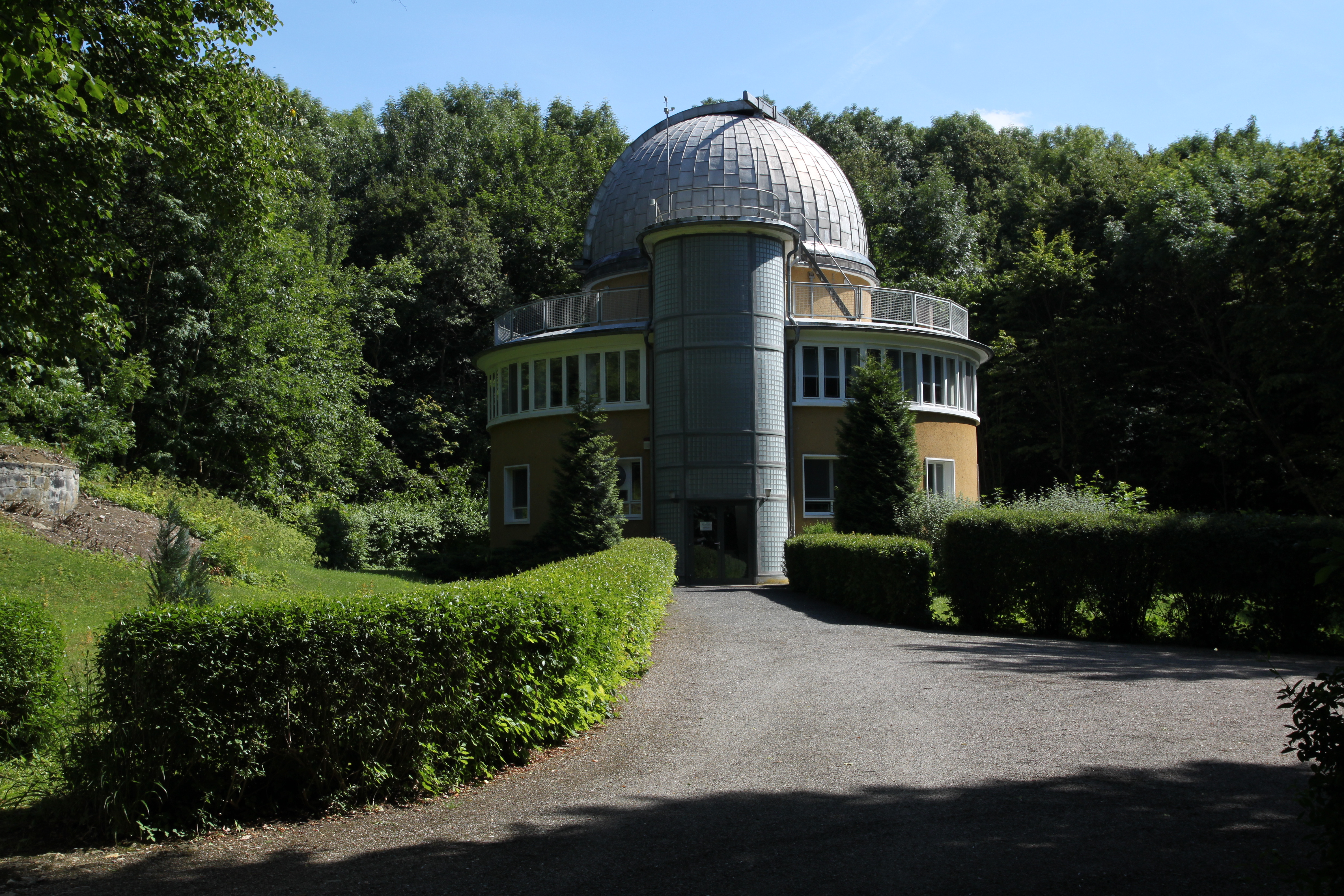 Universitätssternwarte im Großschwabhausener Hain